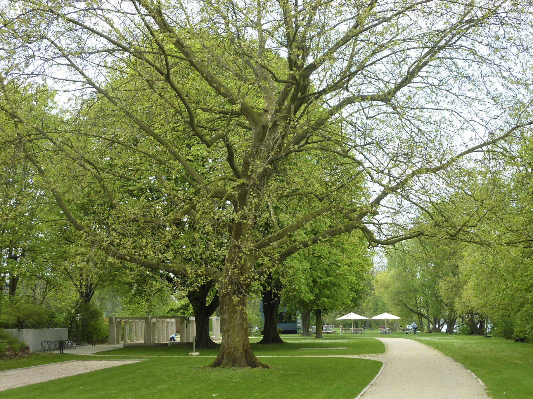 Frankfurt am Main, Stadtteil Niederrad: Das Licht- und Luftbad Niederrad ist eine städtische Grünanlage auf einer schmalen Landzunge am südlichen Mainufer. Das Foto zeigt einen Blick nach Westen, etwa von der Mitte der 500 Meter langen Landzunge aus. Im Hintergrund das im Park eingerichtete Café LILU 1